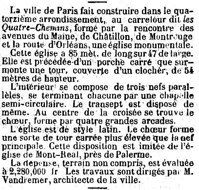 Article sur la construction de l'église Saint-Pierre-de-Montrouge dans le 14ème arrondissement de Paris.